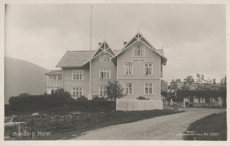 Hundorp Hotel sett fra Hundorp stasjon. Ca 1920